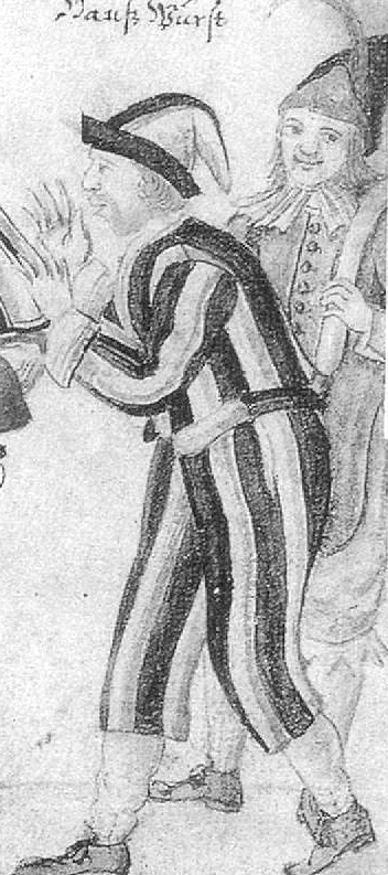 Altdeutscher Hanswurst aus Köngen, 1716. Landesmuseum Württemberg, Stuttgart.